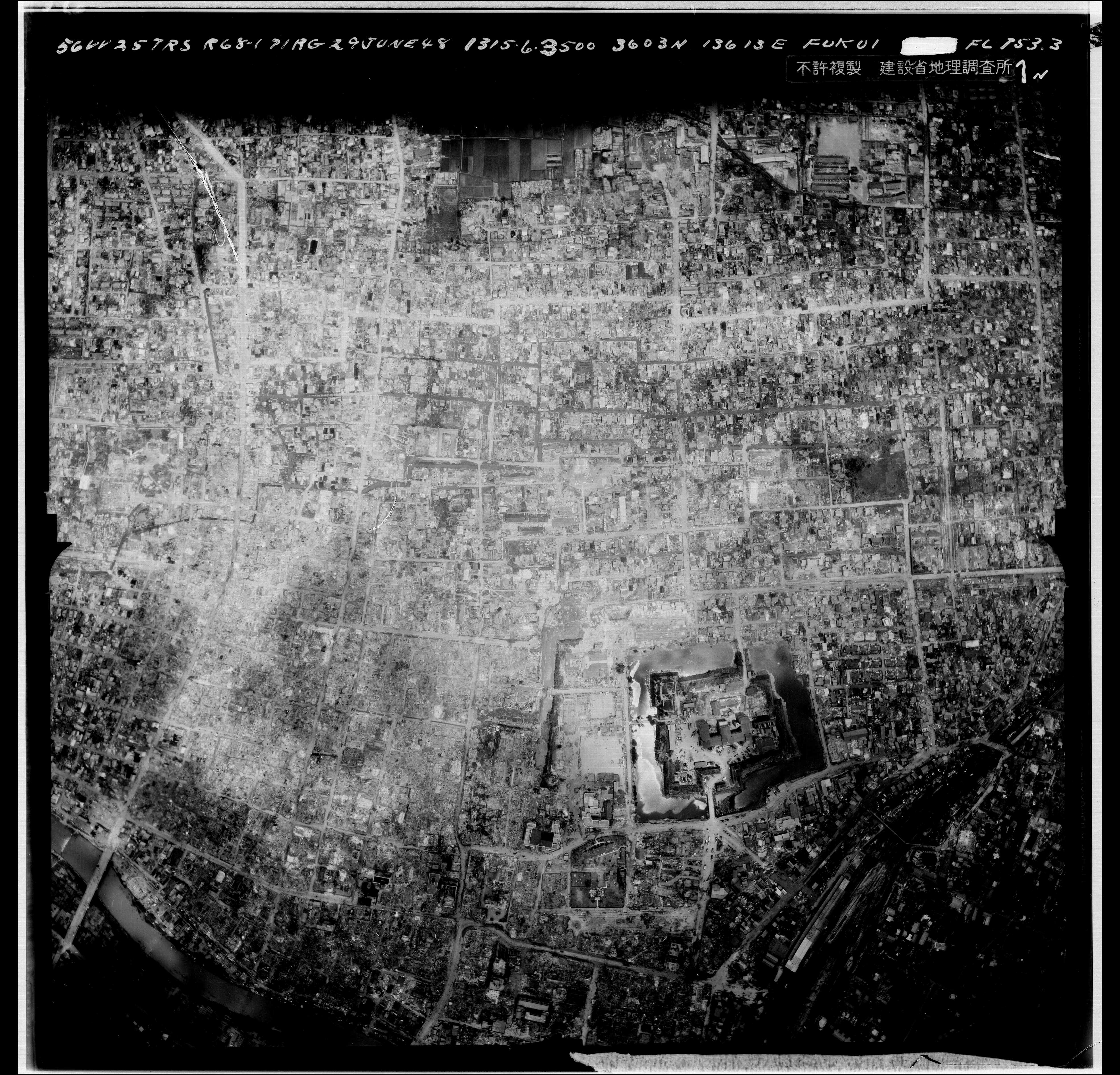 地震翌日に米軍により撮影された福井市街地の空中写真（中央やや右下が現福井県庁）。多数の建物の倒壊が確認できる。